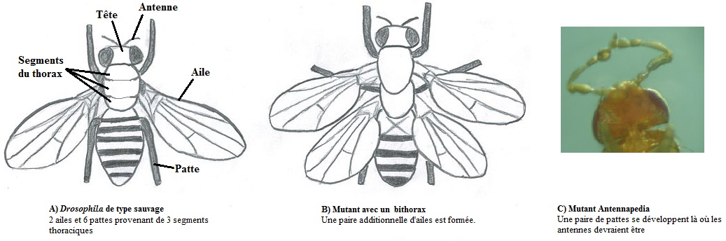 Mouche drosophila sous son phénotype sauvage (A), sous son phénotype mutant du gène Bithorax (B) et sous son phénotype mutant du gène Antennapedia (C).